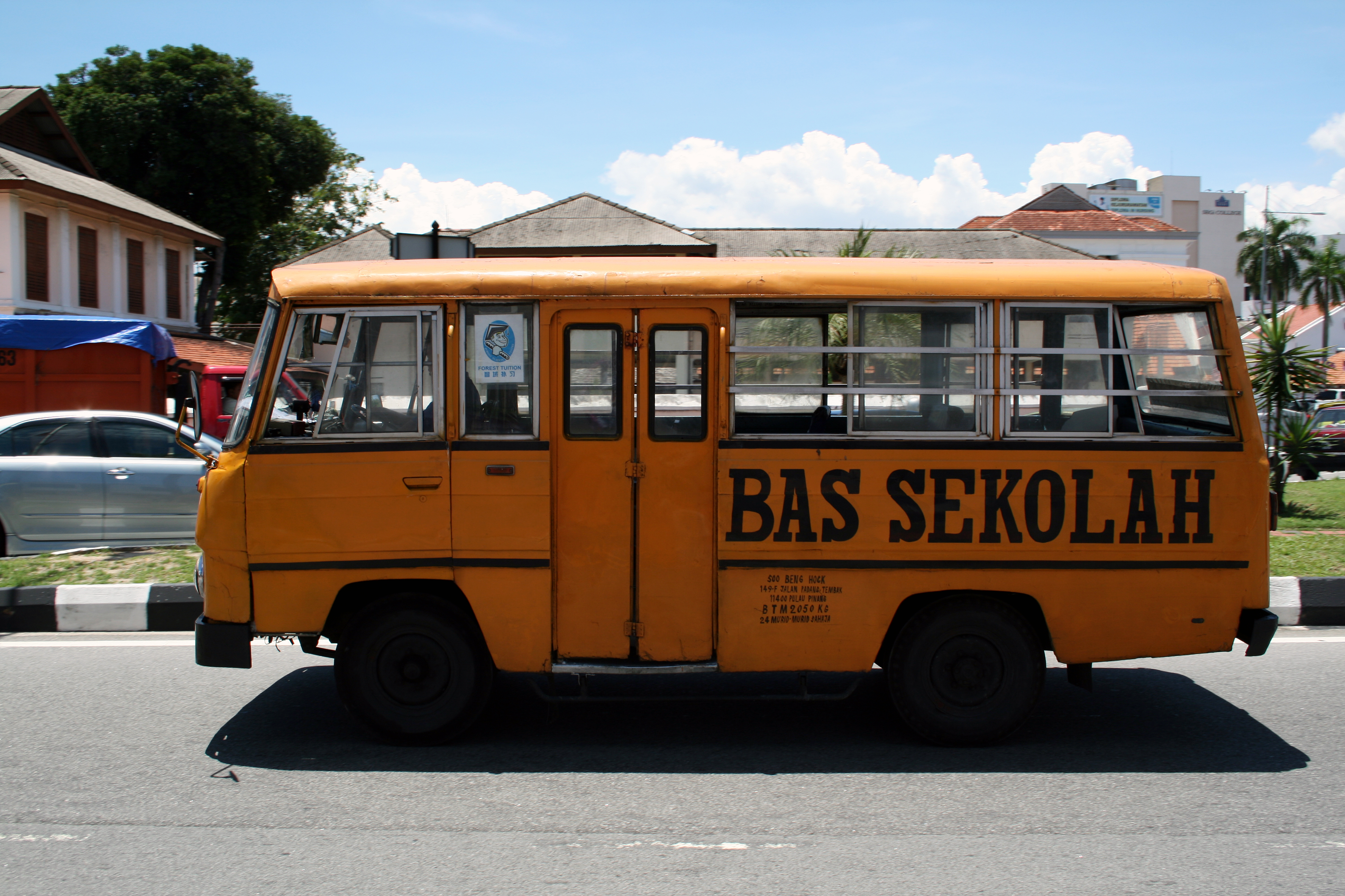 马来西亚校车